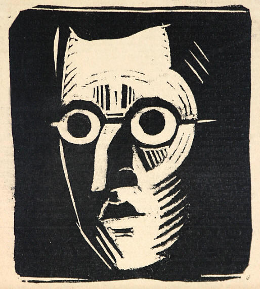 Tvorba Josefa Čapka